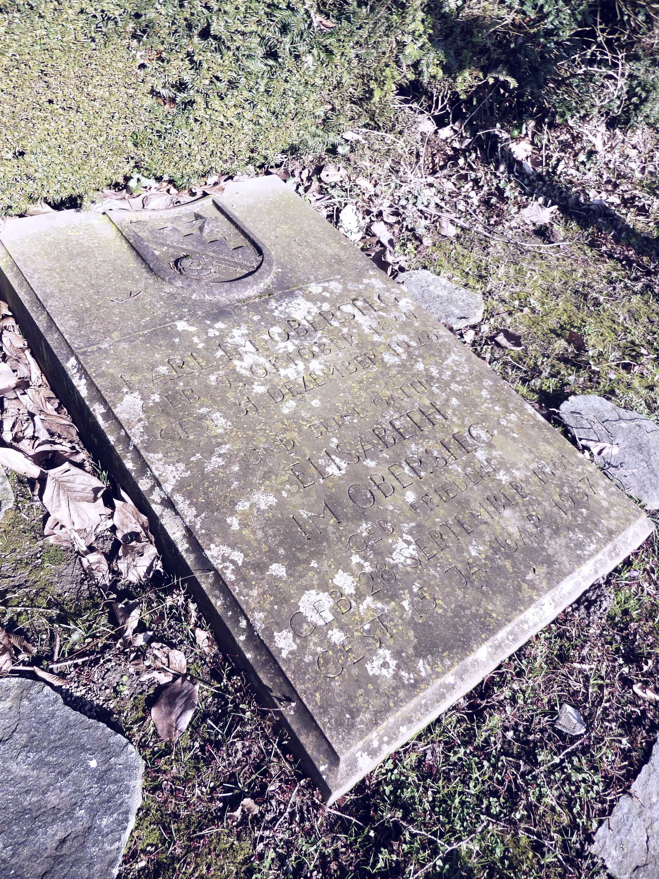 Karl Johann Im Obersteg-Friedlin (1849-1926), Unternehmer, Sammler. Elisabeth Im Obersteg-Friedlin (1861-1937). Grab auf dem Friedhof am Hörnli.